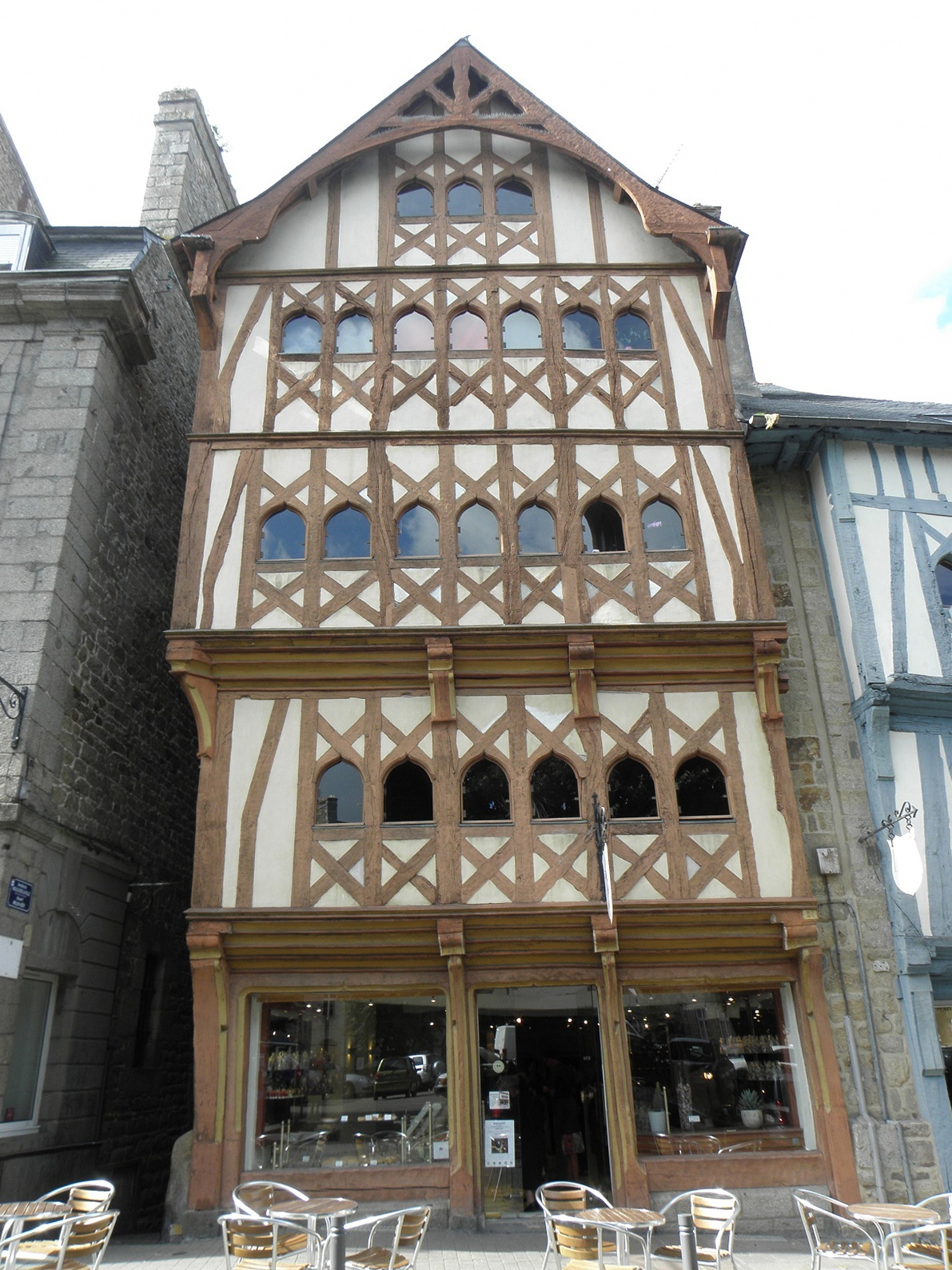 Maison sise 31 Place du Centre à Guingamp (22).